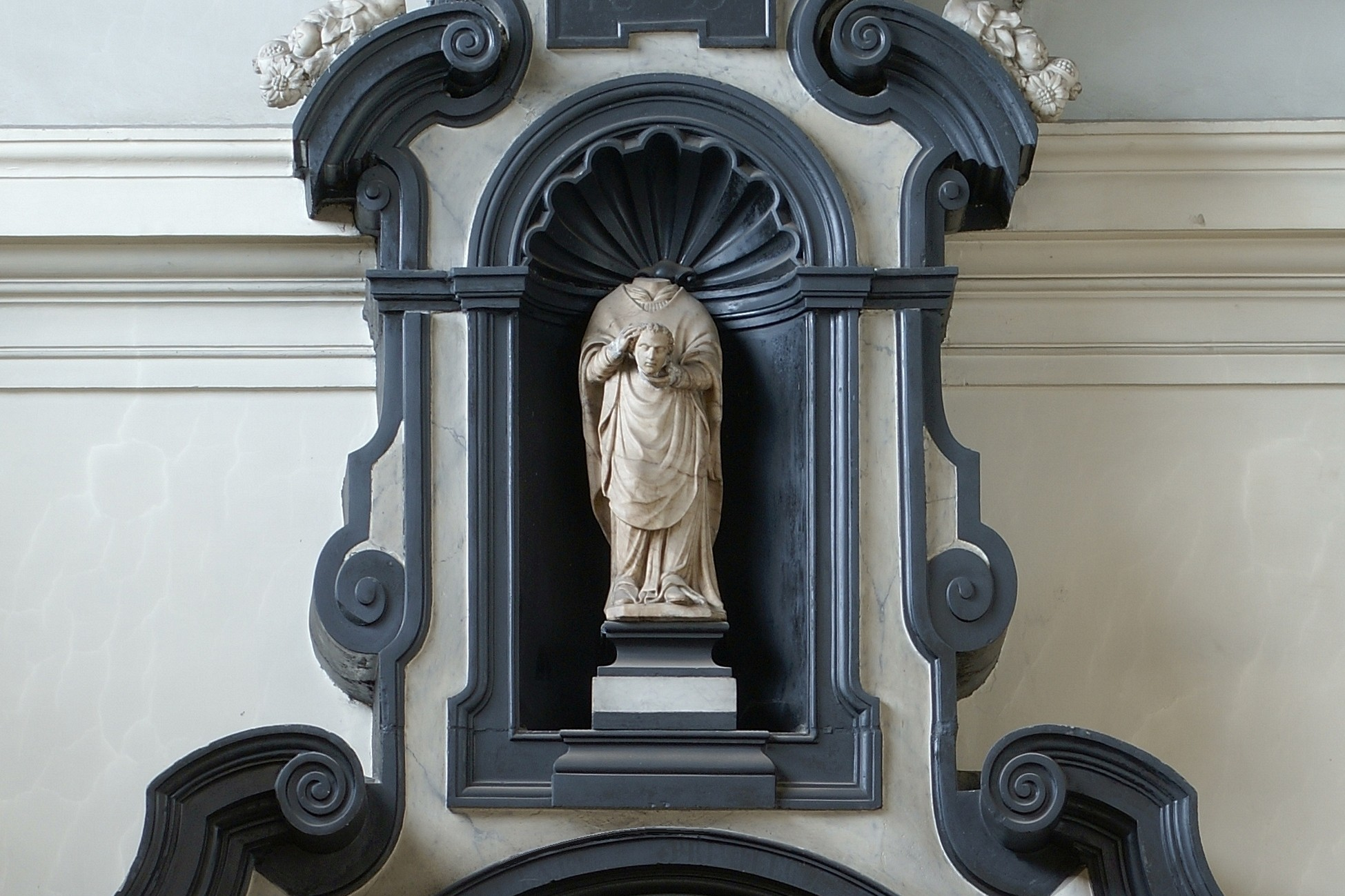 Cathédrale de St-Aubain (Namur) - Autel de St-Aubain (année 1655)